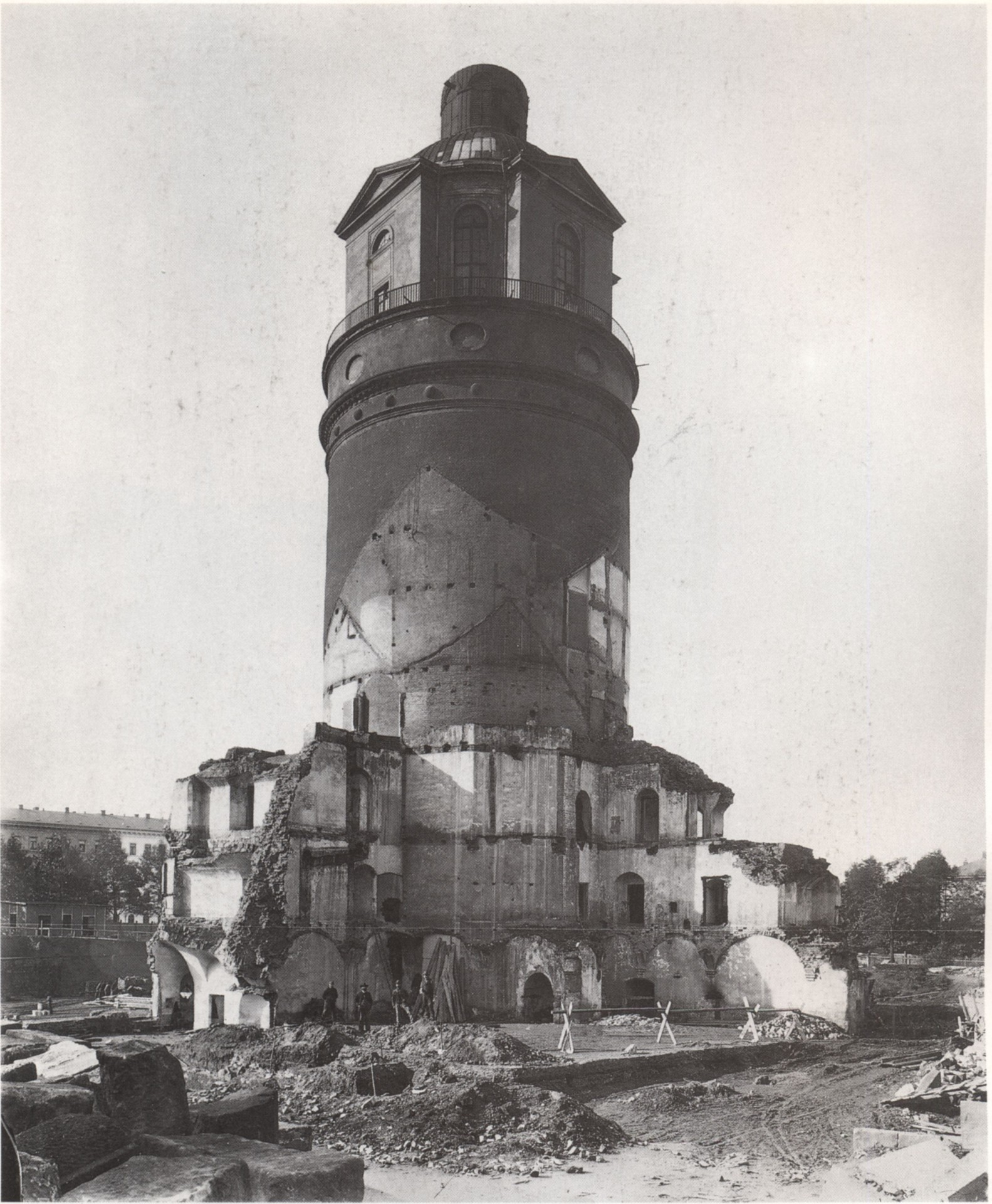 Abriss der Pleißenburg im Jahre 1899.